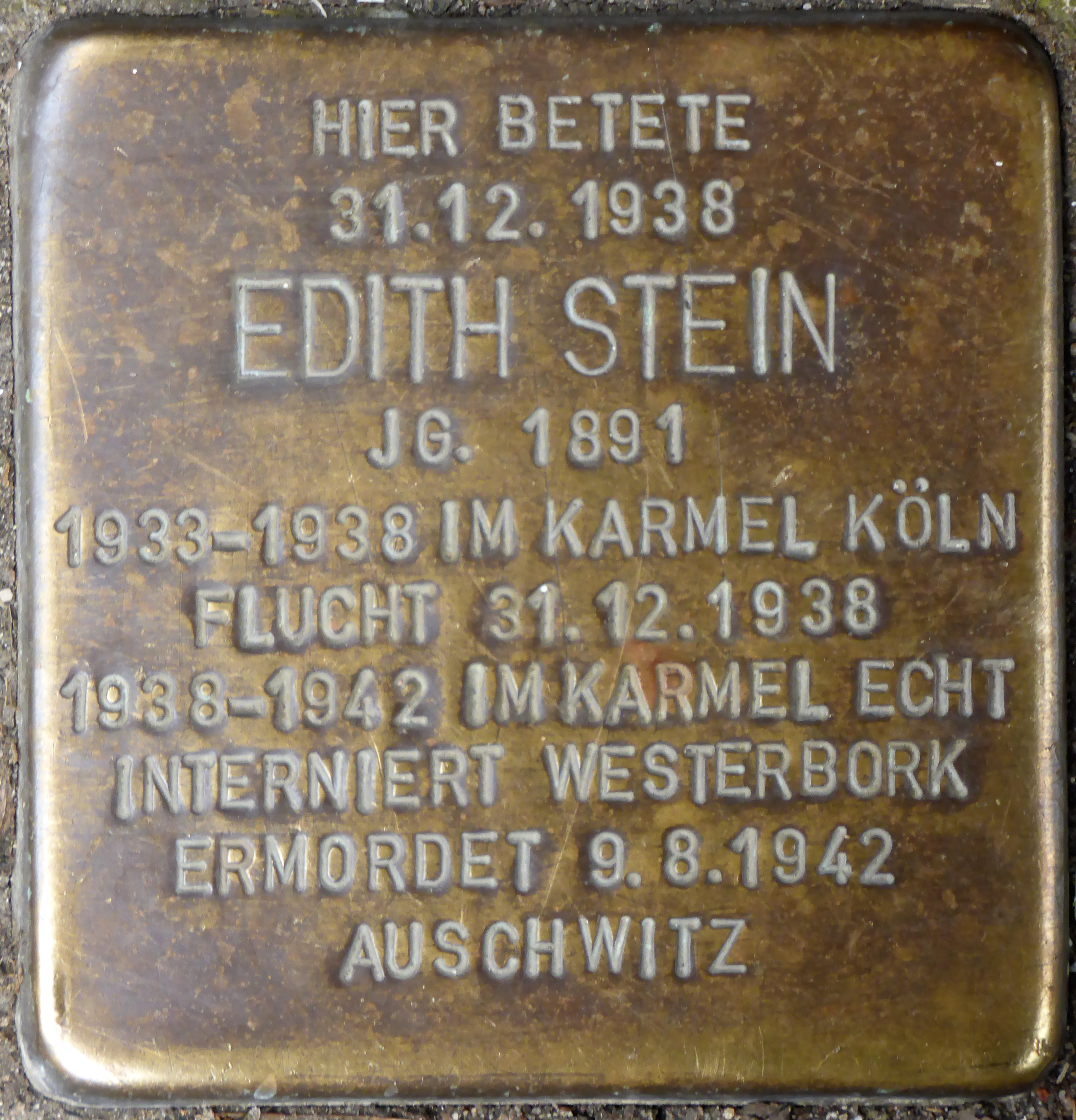 Stolperstein: Edith Stein Vor den Siebenburgen 6 (Karmel Maria vom Frieden), Köln.